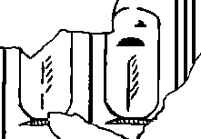 kartuschenname "teti" aus der schreibtafel von gizeh/cartouche name "teti" from the writing board of Giza